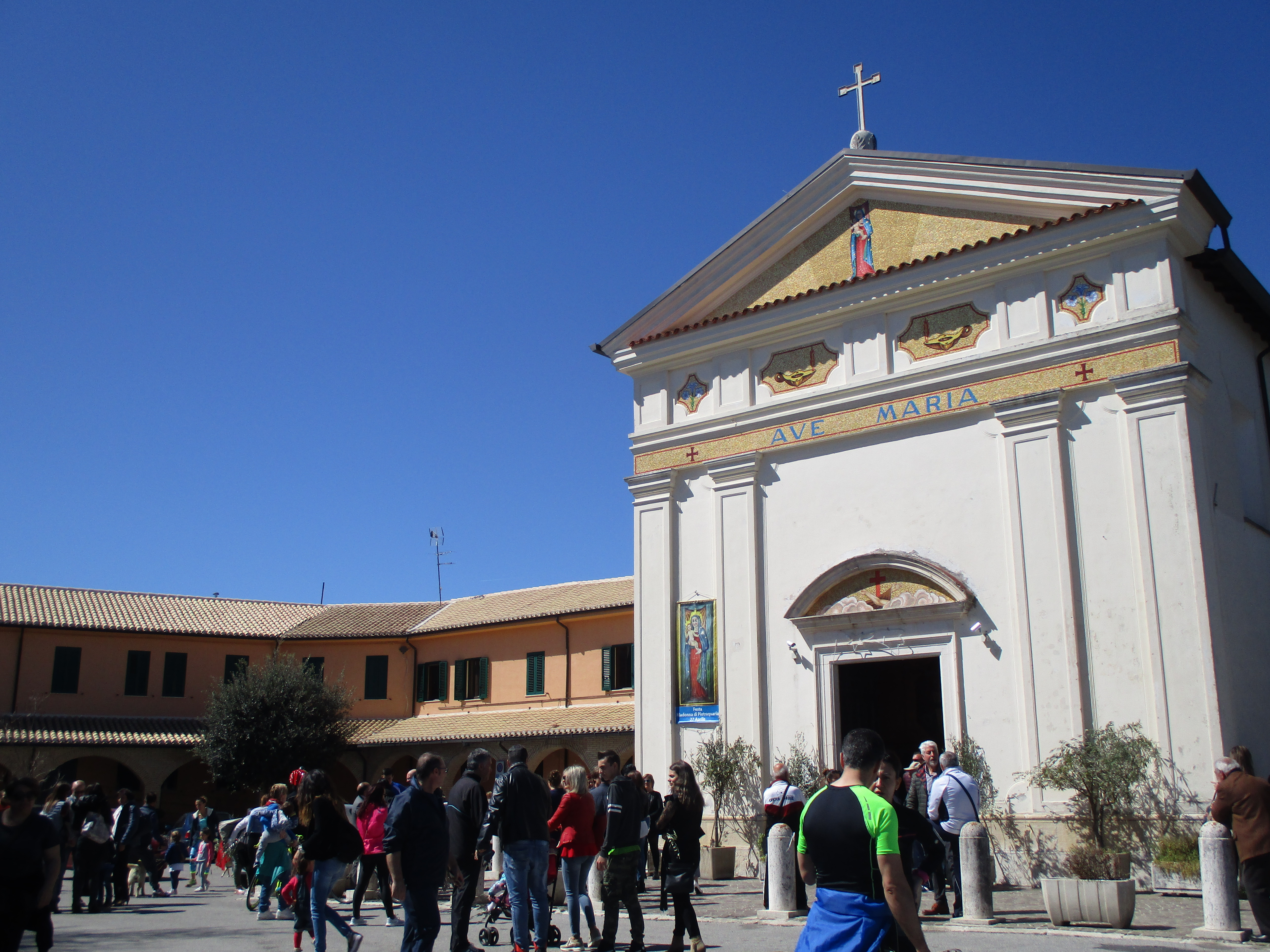 Santuario della Madonna di Pietraquaria